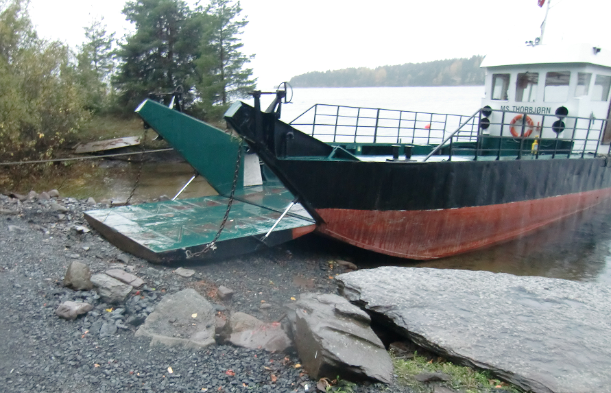 MS Thorbjørn ved kaia på landsiden.